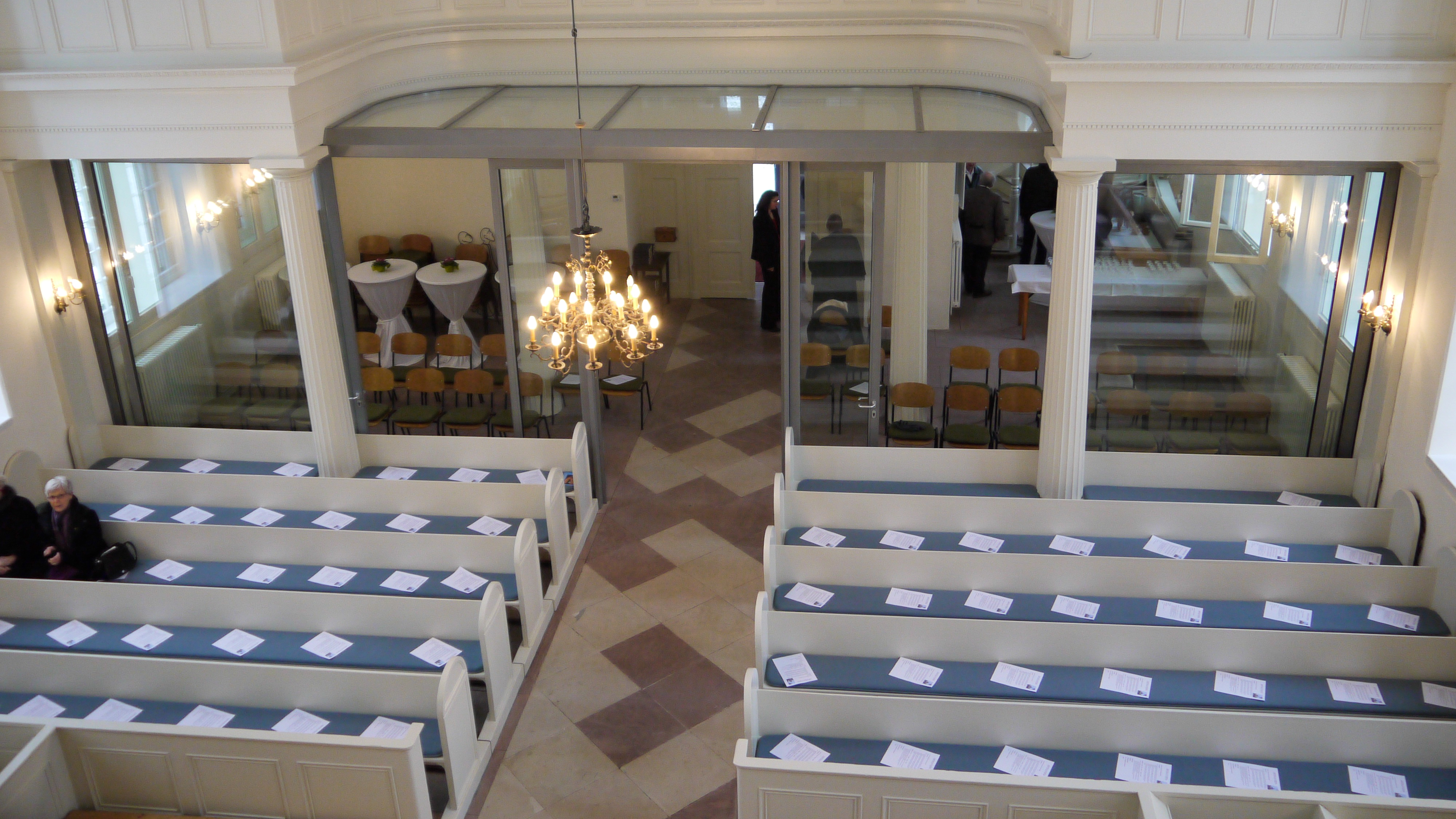 Christuskirche von Salzgitter-Gitter: Innenraum mt dem neuen Gemeideraum unter der Empore